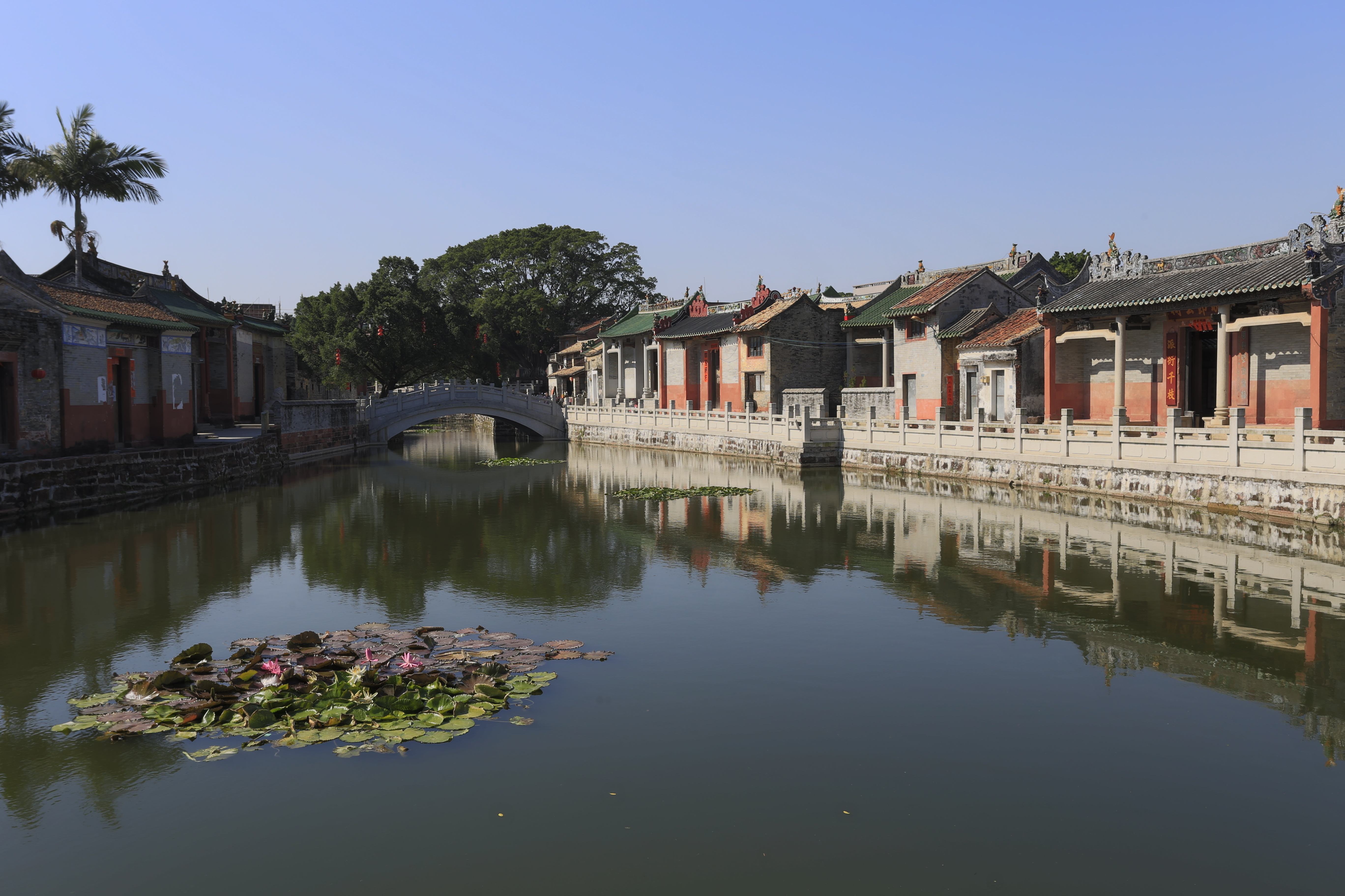 南社村，位于东莞市茶山镇